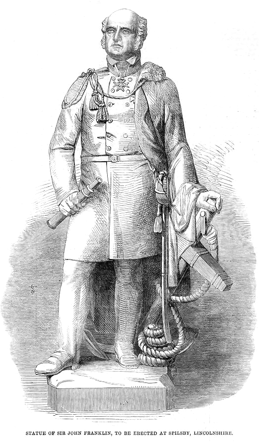 Sir John Franklin KCH FRGS RN (16 April 1786 – 11 June 1847)